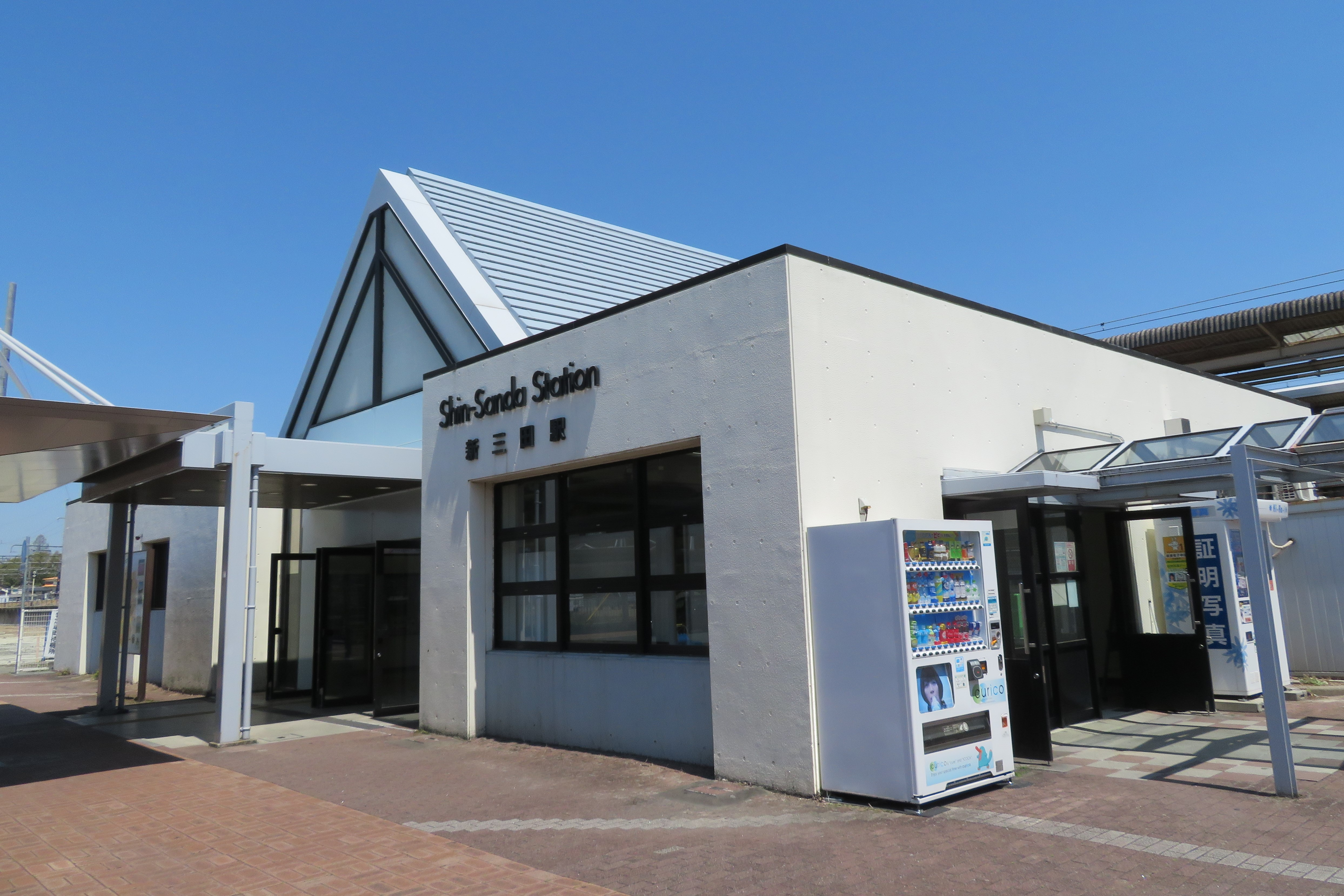 JR新三田駅